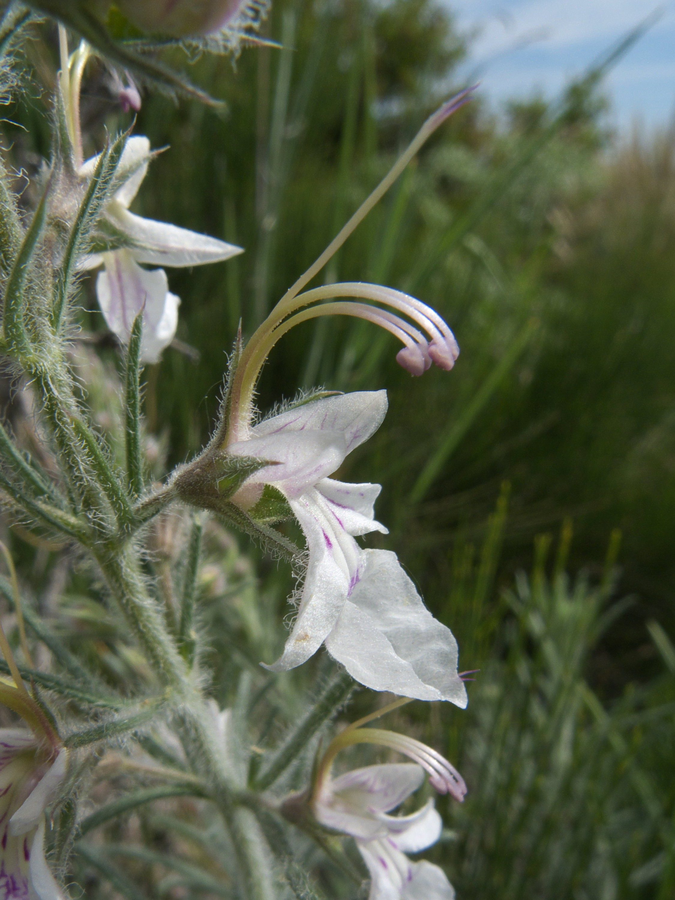 Flor de Teucrium pseudochamaepitys (Lamiaceae, Lamiales). Rivas Vaciamadrid, Madrid, España.